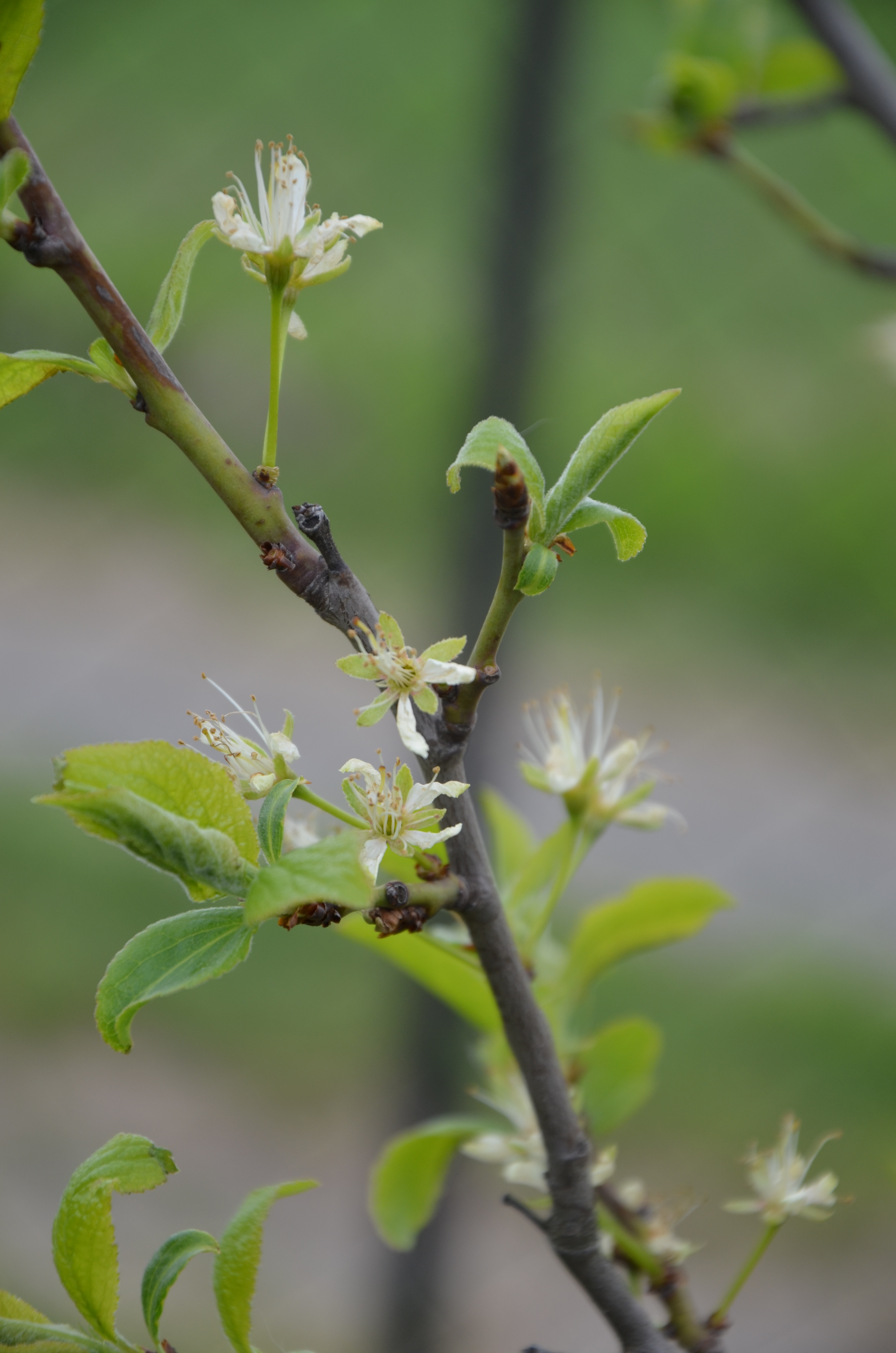 Detail květu šlapanické švestky na zahradě Stanislava Juráně